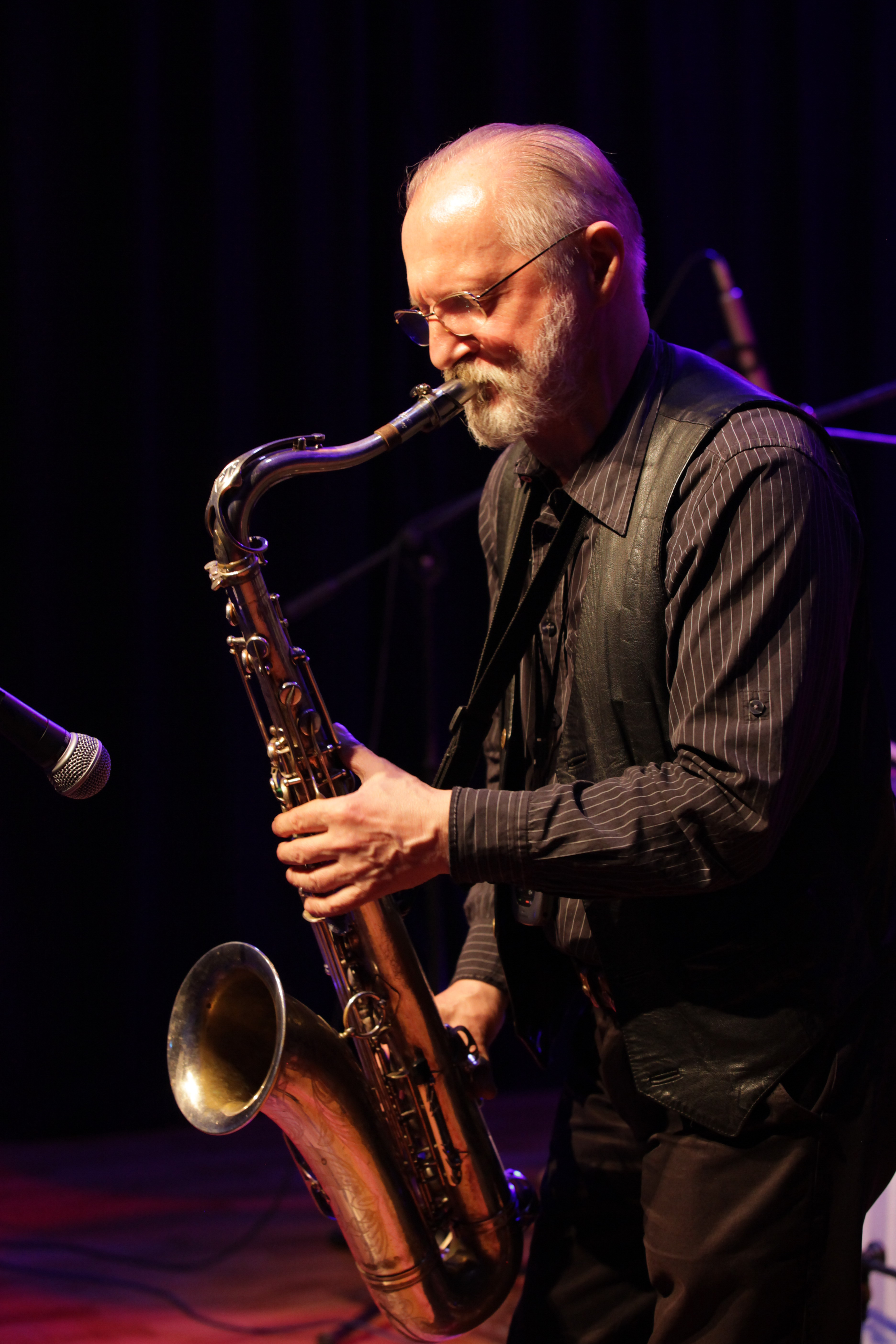 Janusz Muniak - polski muzyk jazzowy, saksofonista, flecista, aranżer i kompozytor. Pińczów, 9. Zaduszki Jazzowe, 2 listopada 2013 r.